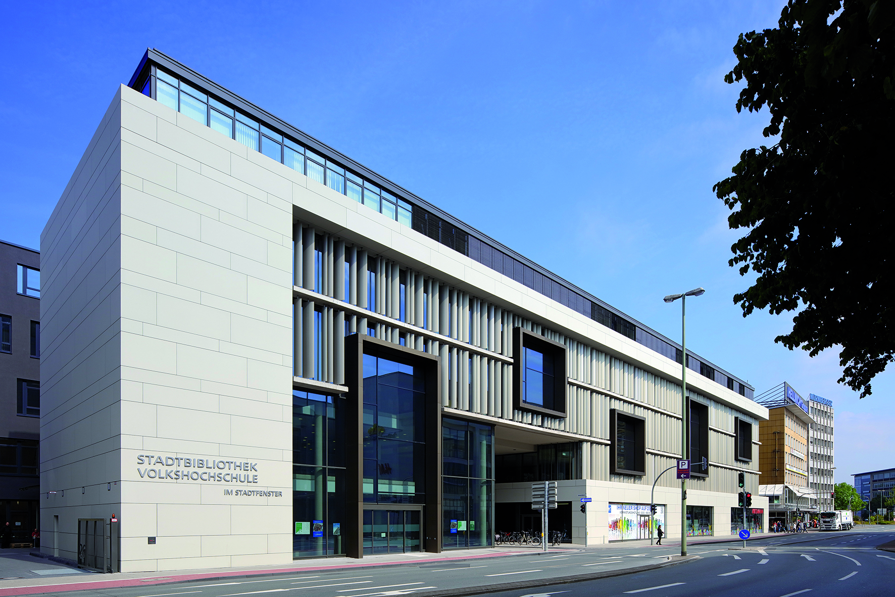 Duisburger Stadtfenster mit Zentrale der Stadtbibliothek und der Volkshochschule